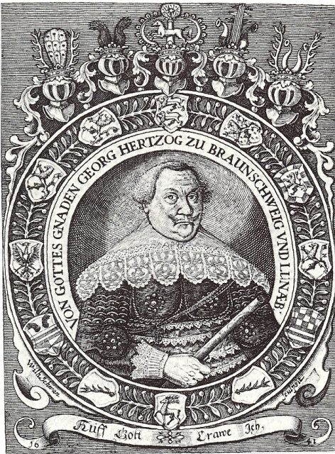 Kupferstich mit dem Brustbild des Georg, Herzog zu Braunschweig und Lüneburg in einer Rüstung aus der Zeit des Dreißigjährigen Krieges